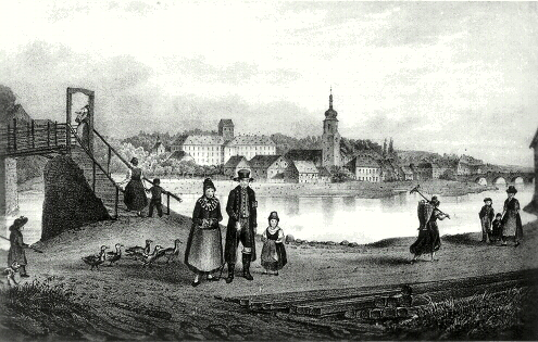 Ortsansicht von Oberkotzau mit Kirche und Schloss